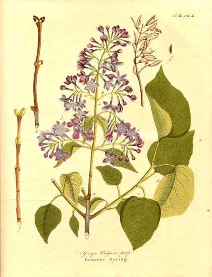 Afbeeldingen der fraaiste, meest uitheemsche boomen en heesters by Johan Carl Krauss. Amsterdam, Johannes Allart, 1802 [-1808]. Hand-coloured engraving (sheet 228 x 284 mm).